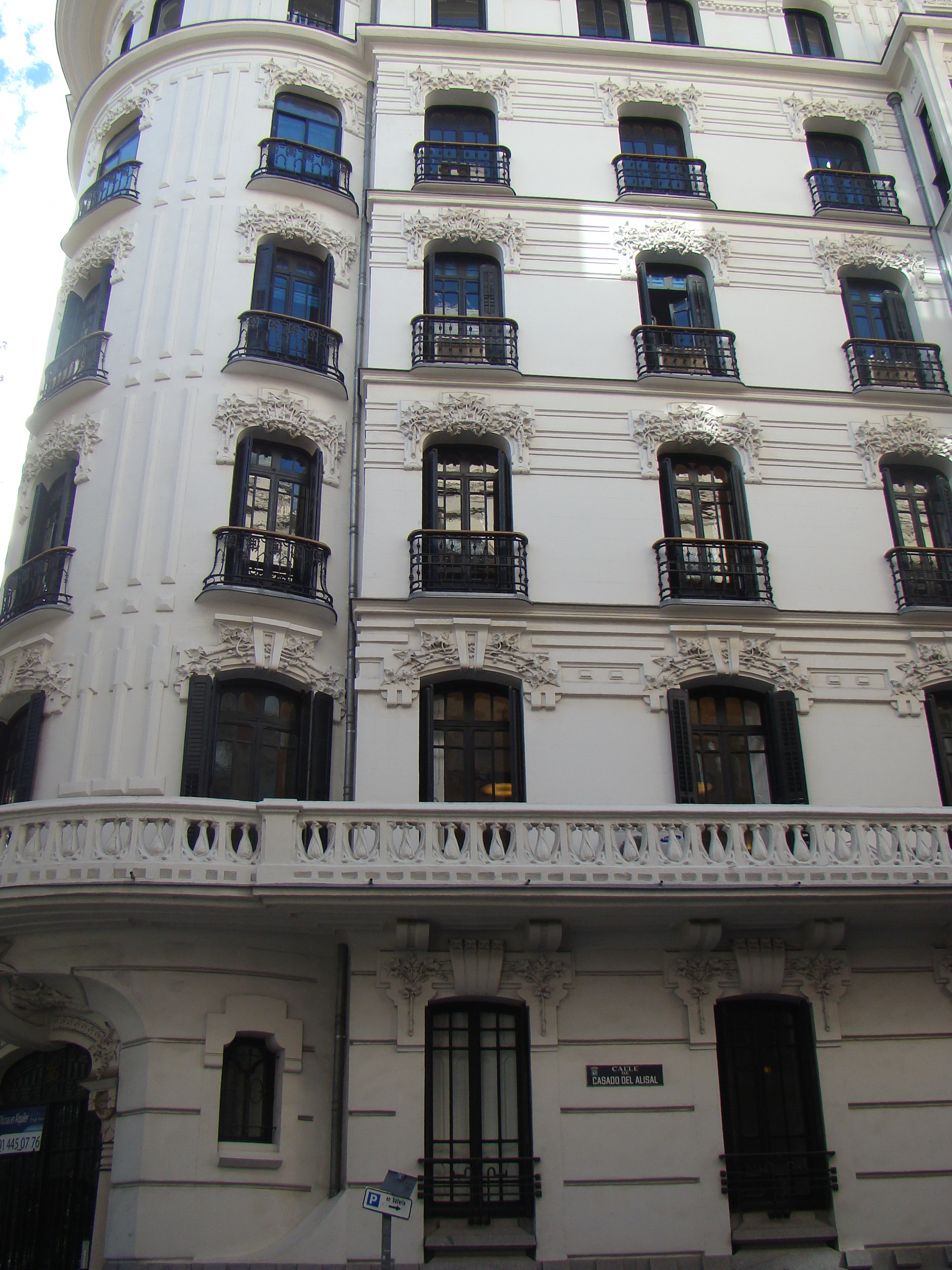 Madrid, España. Calle de Alfonso XII esquina a Casado del Alisal. Barrio de los Jerónimos. Dos viviendas modernistas del diseñador García Nava.